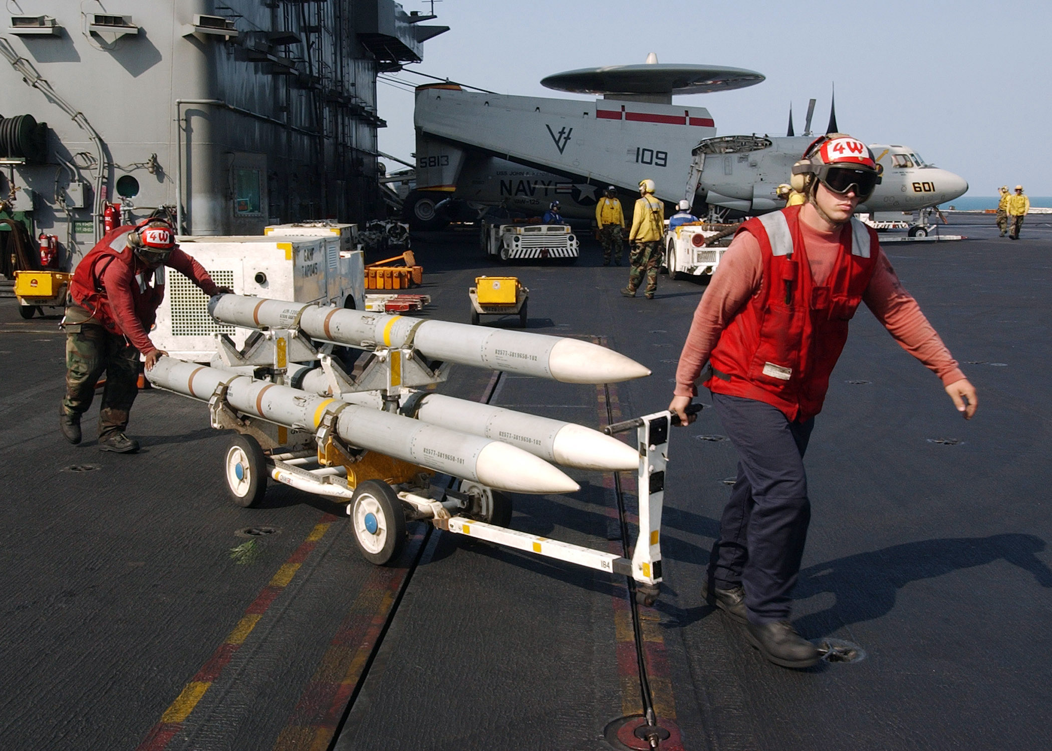 AIM-120 AMRAAM